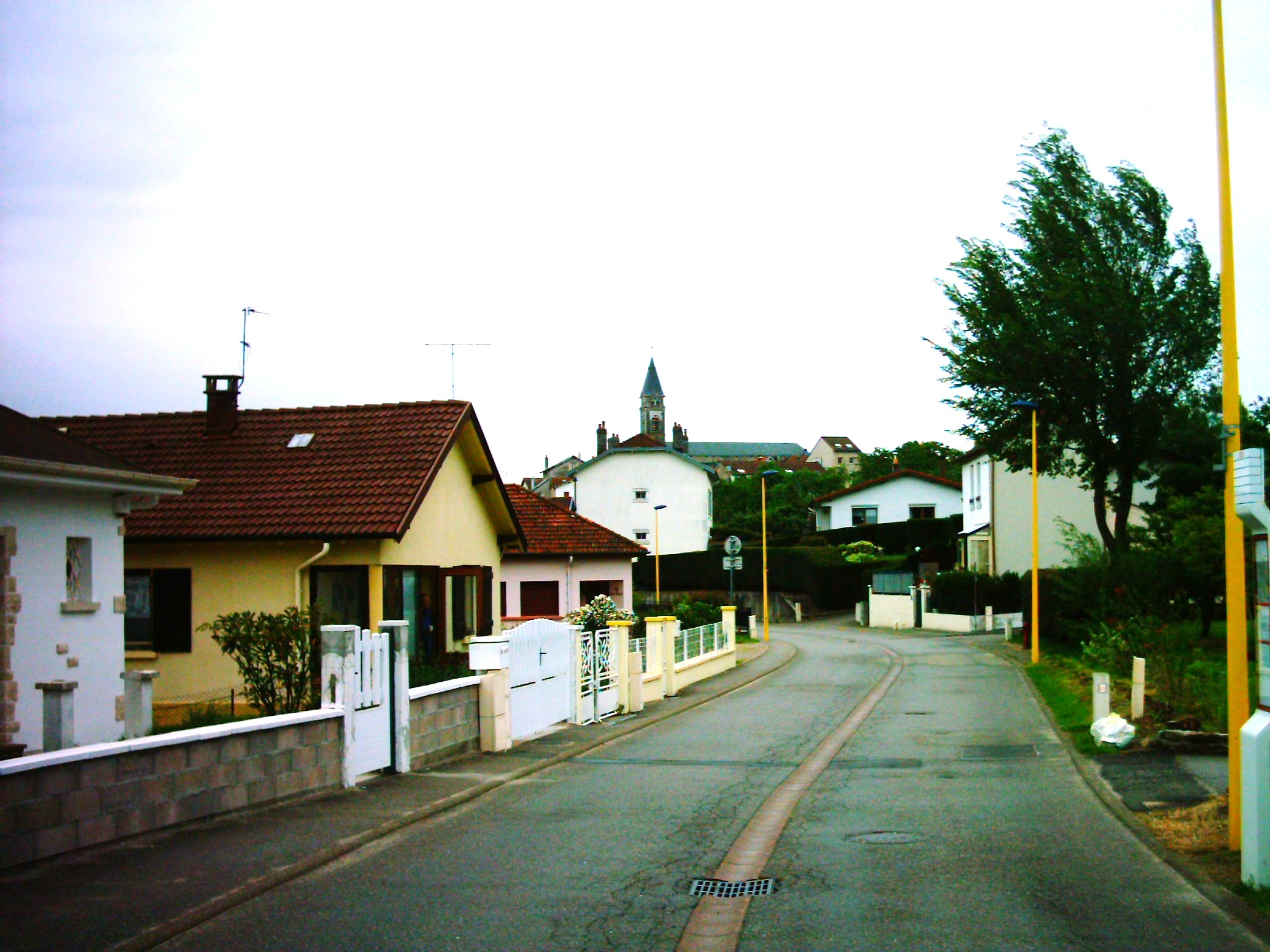 da un lavoro personale, panorama del comune di Chantraine